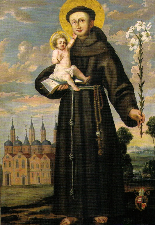 Altarblatt mit Abbildung des hl. Antonius von Padua.